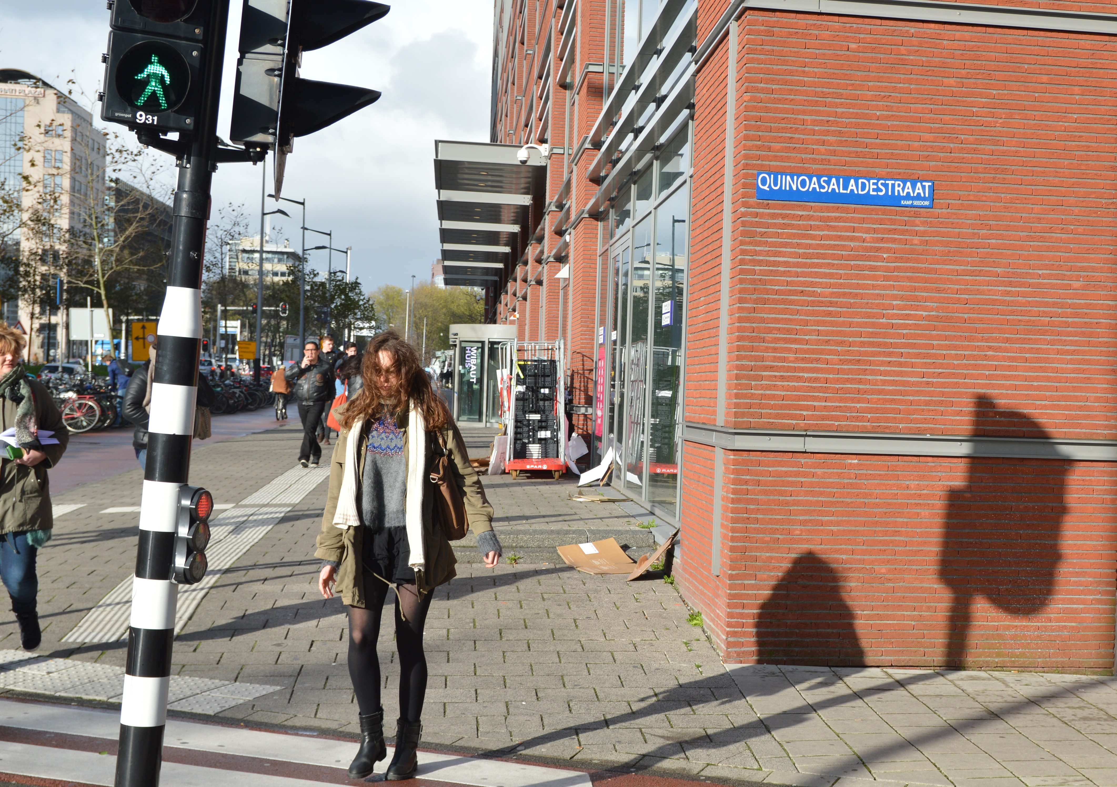 Quinoasaladestraat bordje op de Wibautstraat.